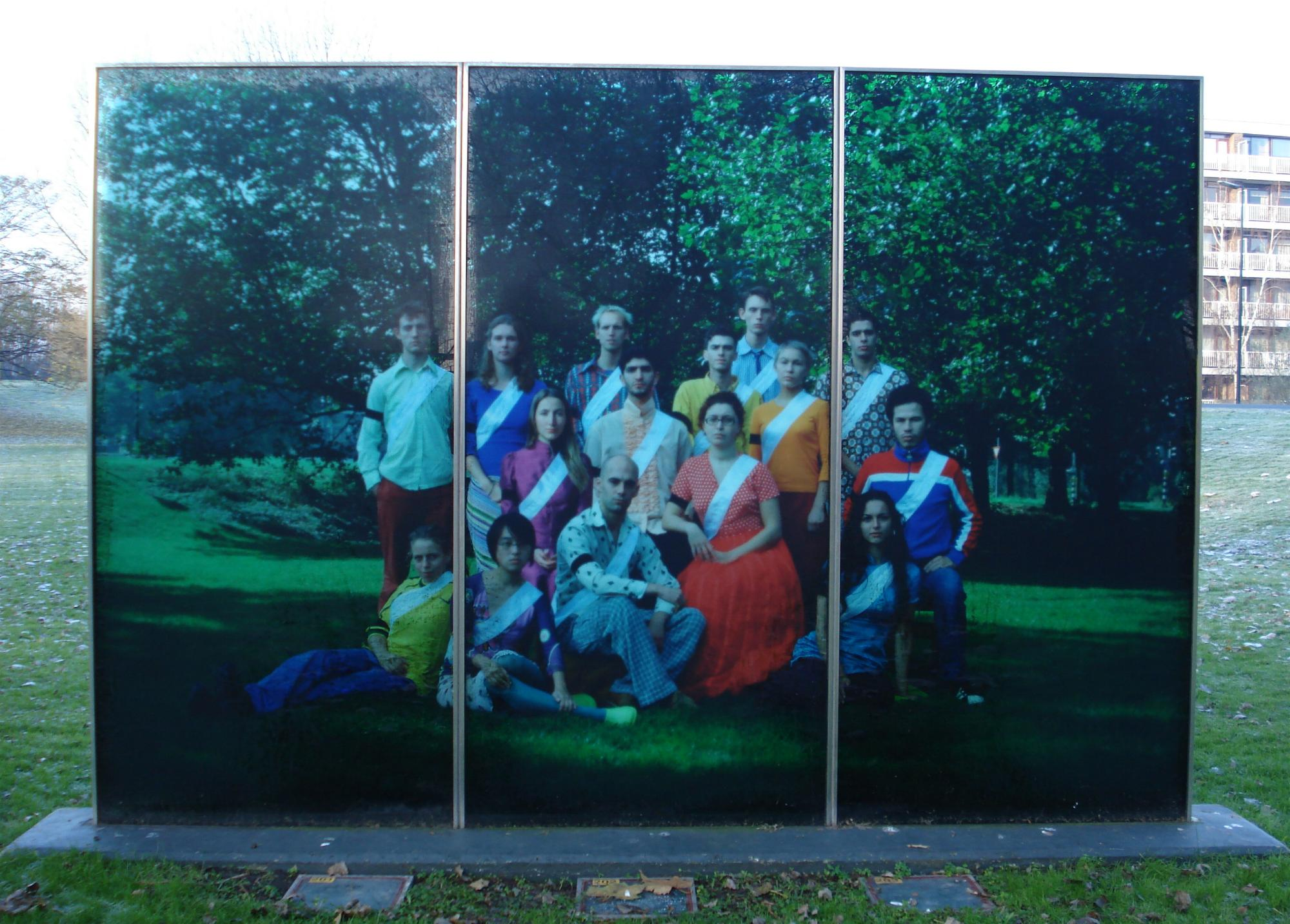 Vlaardingen, Gazon bij station Vlaardingen Oost. "Monument van bezinning" van Rini Hurkmans. Vlaardingen/The Netherlands.